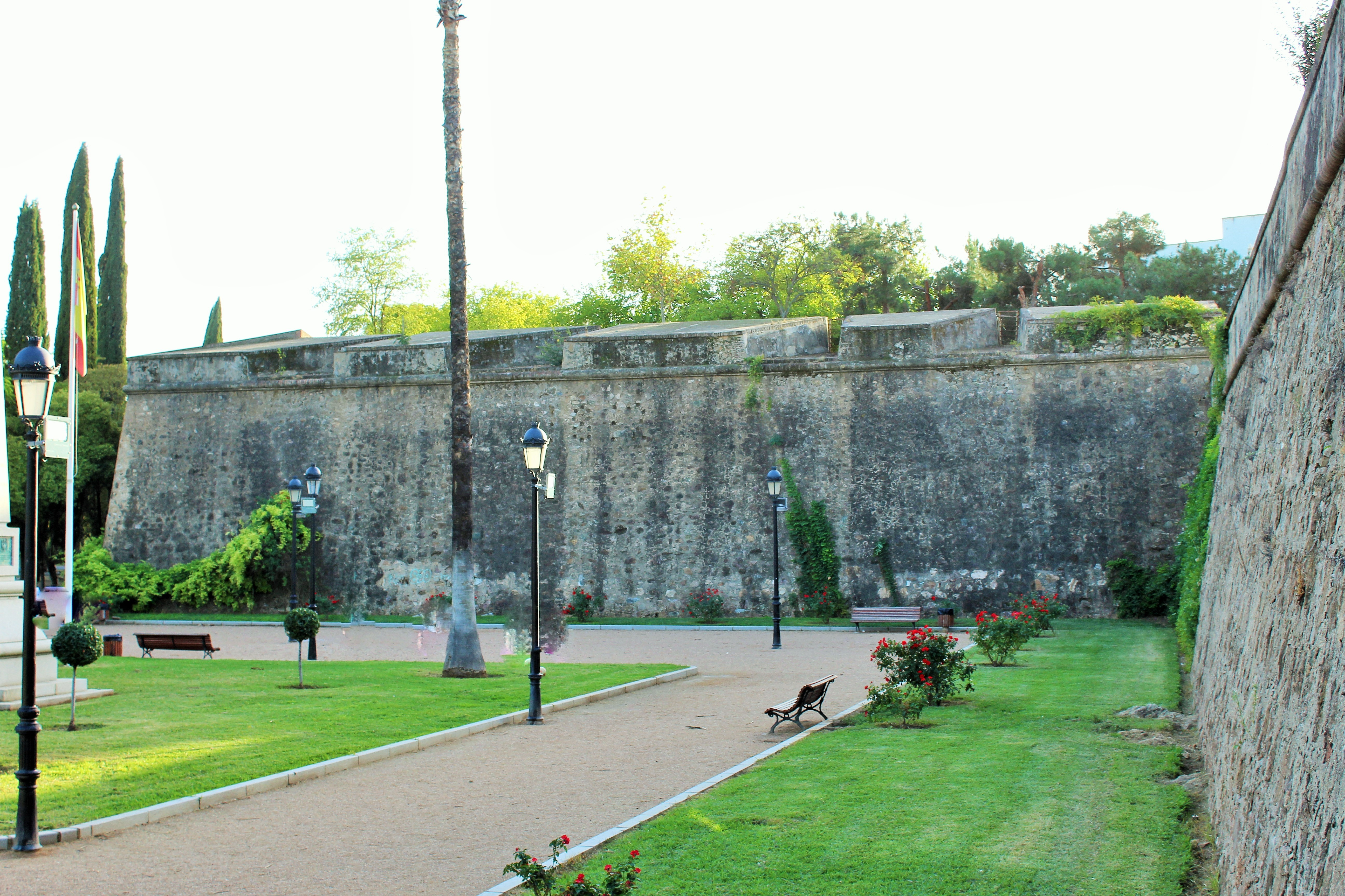 Lienzos sur y este con parque exterior.